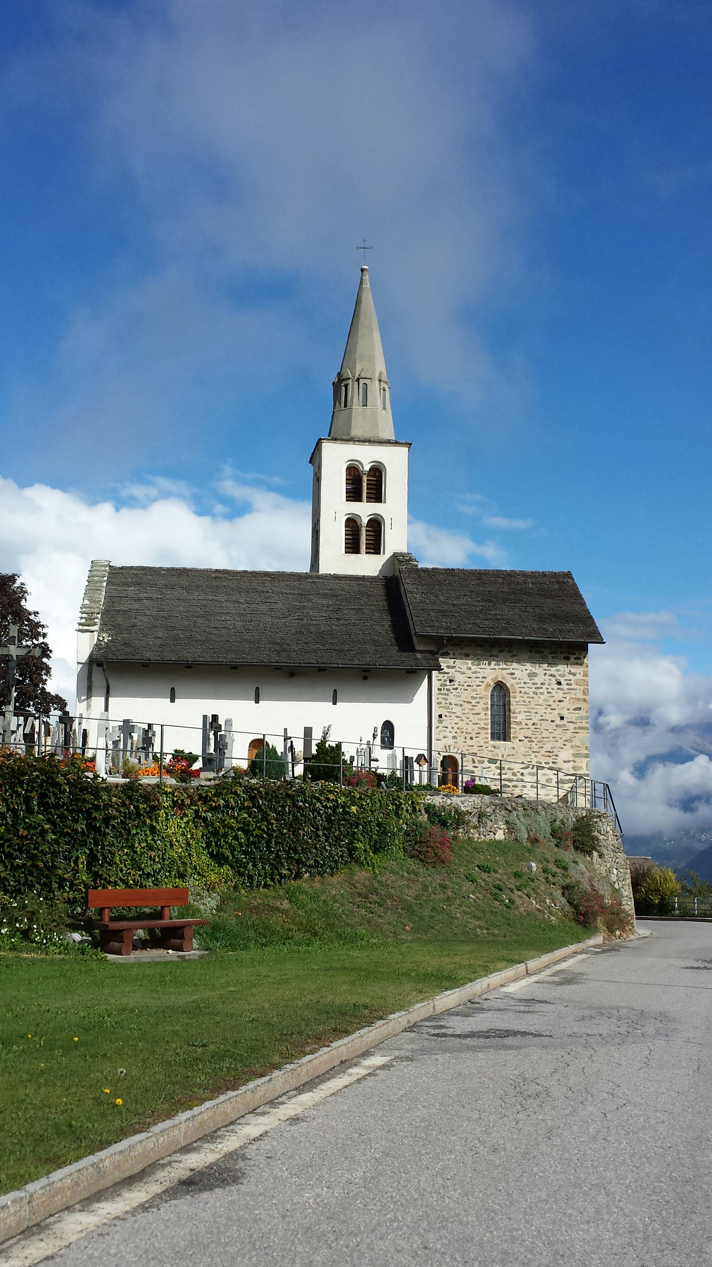 Alte Kirche Saint-Sylve